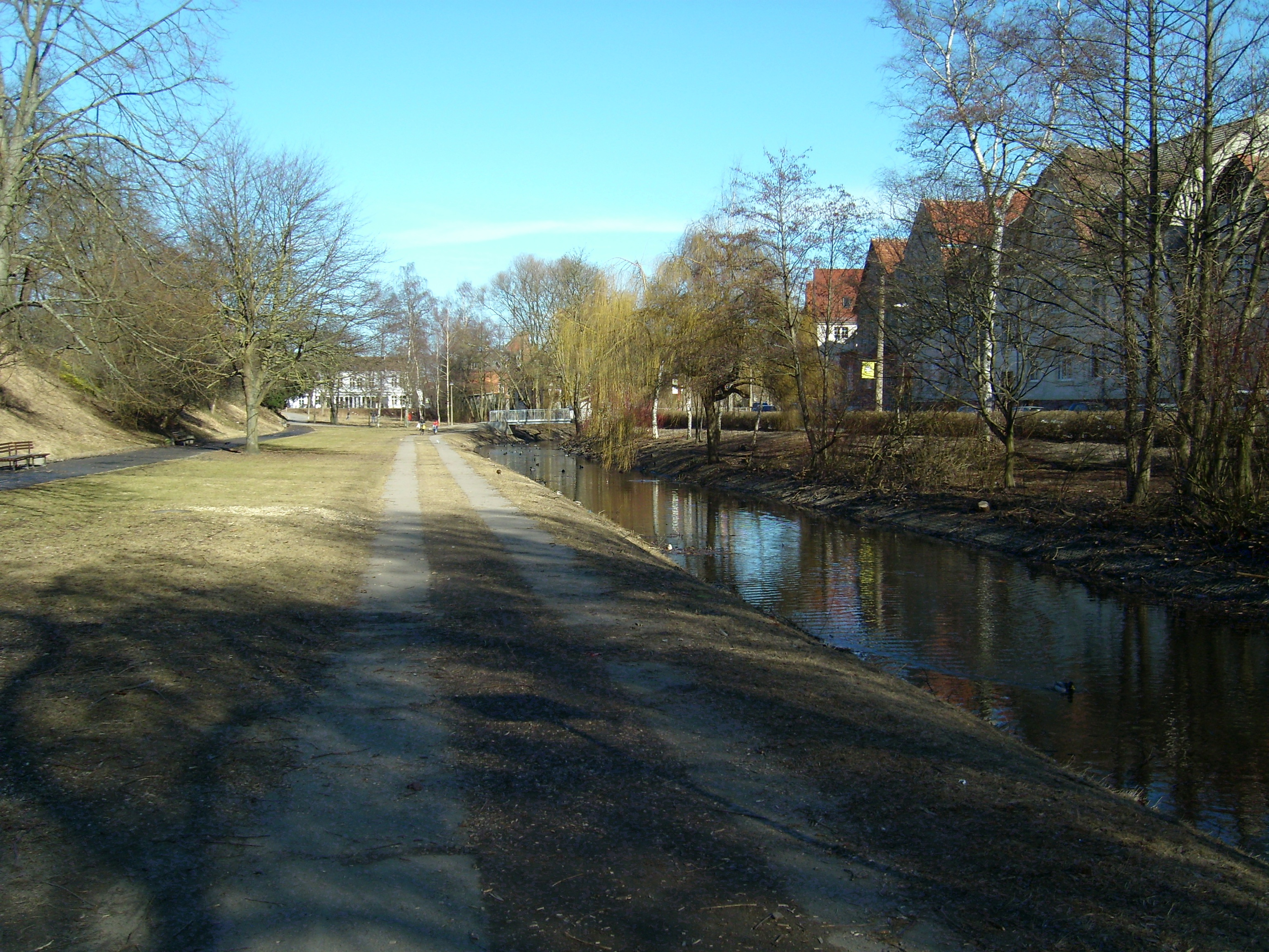 der Greifswalder Stadtgraben zwischen Kastanienwall und Goethestraße